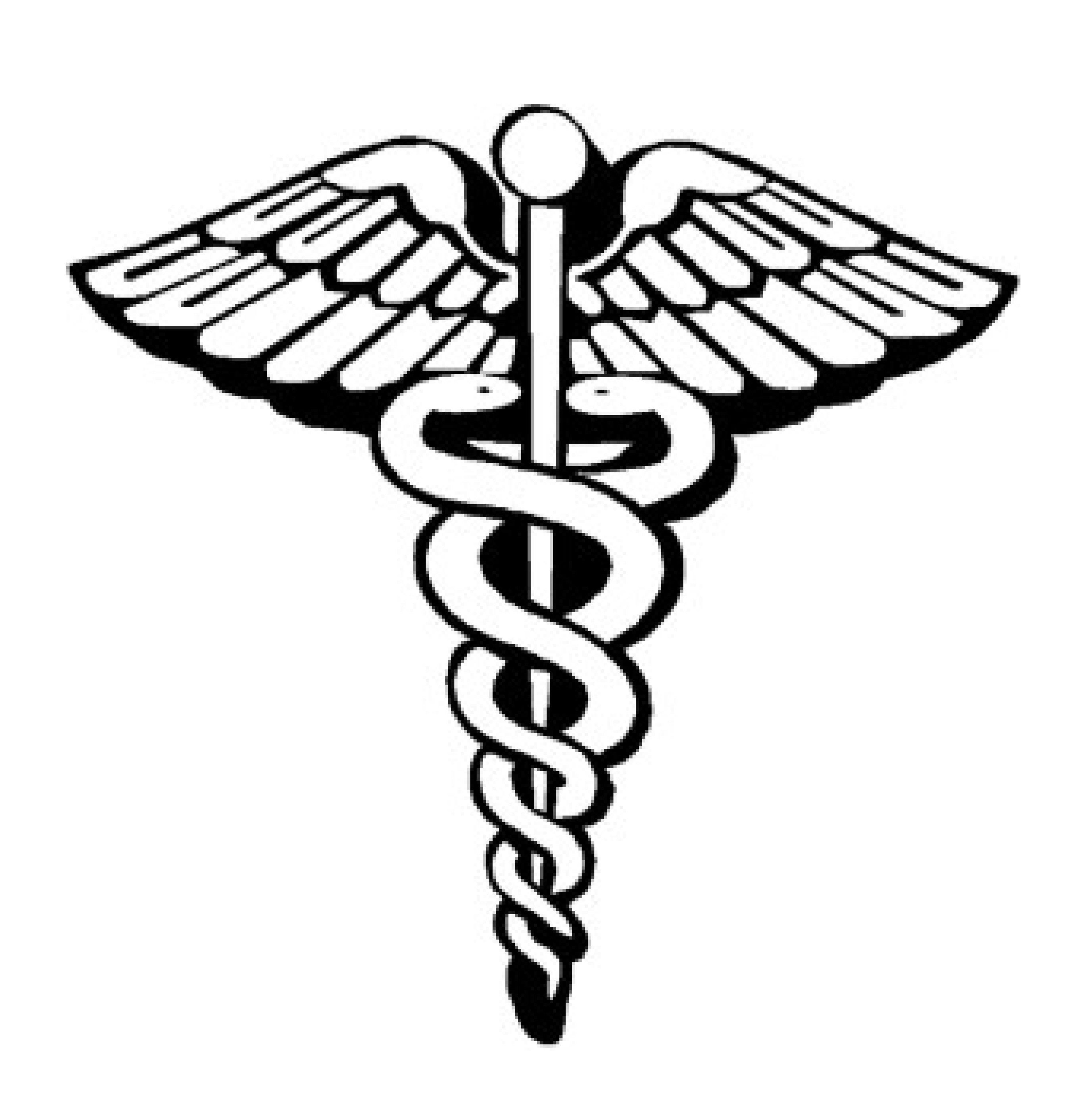 Caduseus